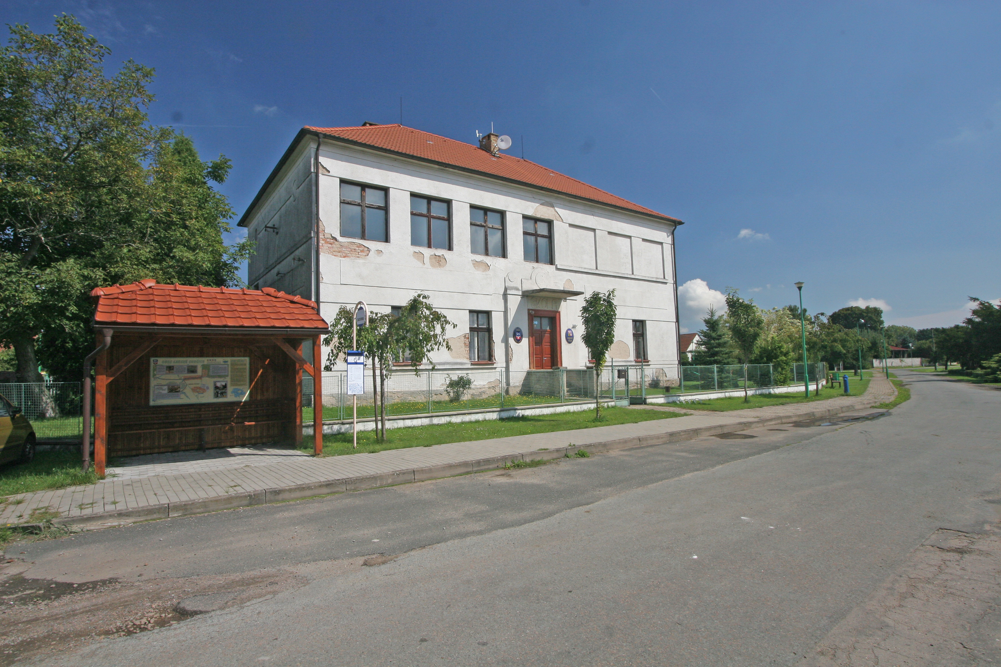 Labské Chrčice obecní úřad